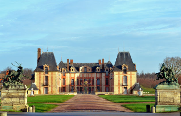 Grosbois gaztelua